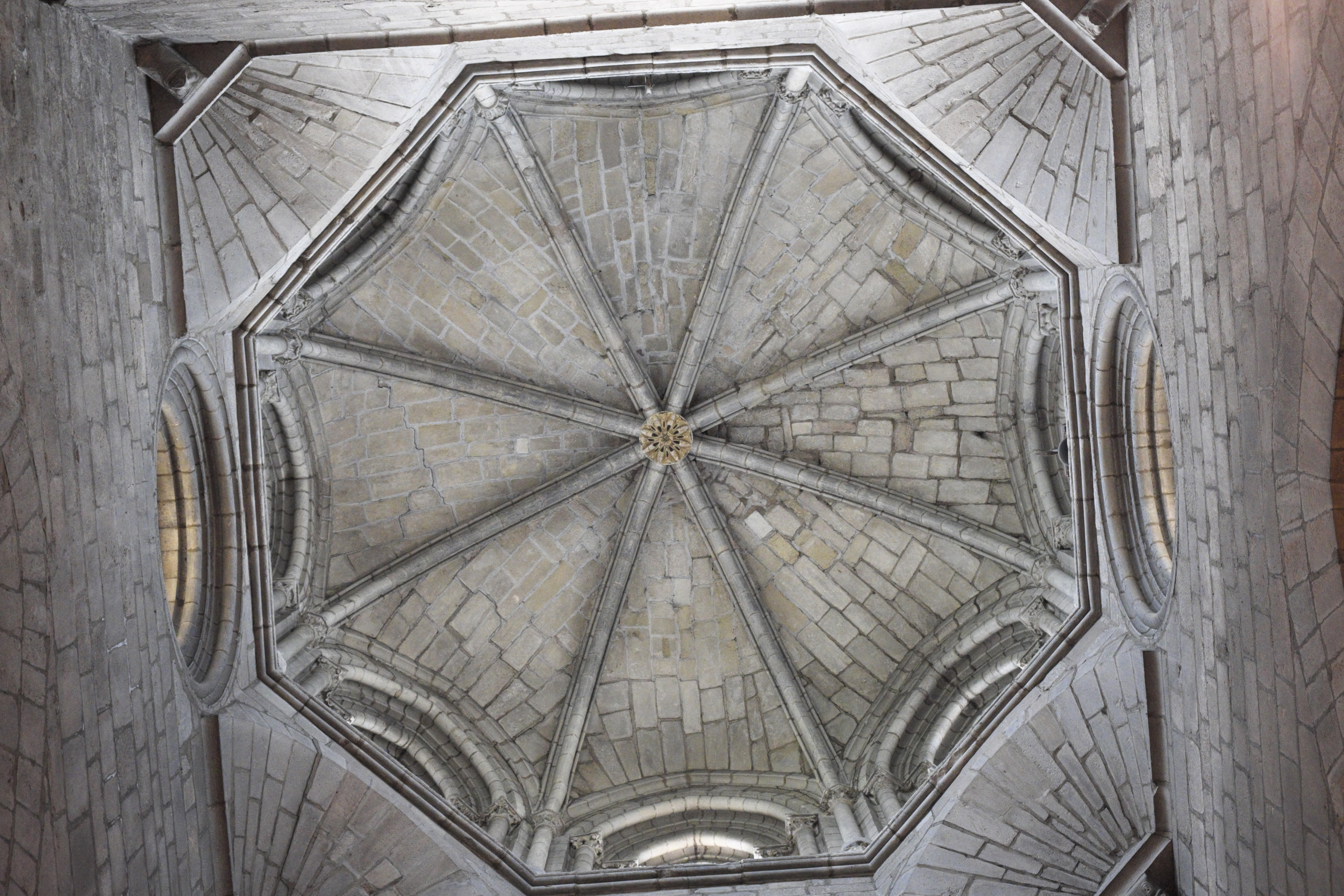 Katholische Pfarrkirche Santa María la Real in Sangüesa in der Region Navarra (Spanien), Vierungskuppel